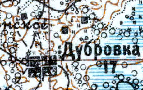 Топографическая карта Ленинградской области, квадрат VIc-28 (Луга), деревня Дубровка